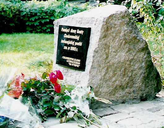 Kamień pamiątkowy poświęcony poetce AB Chodorkowskiej.